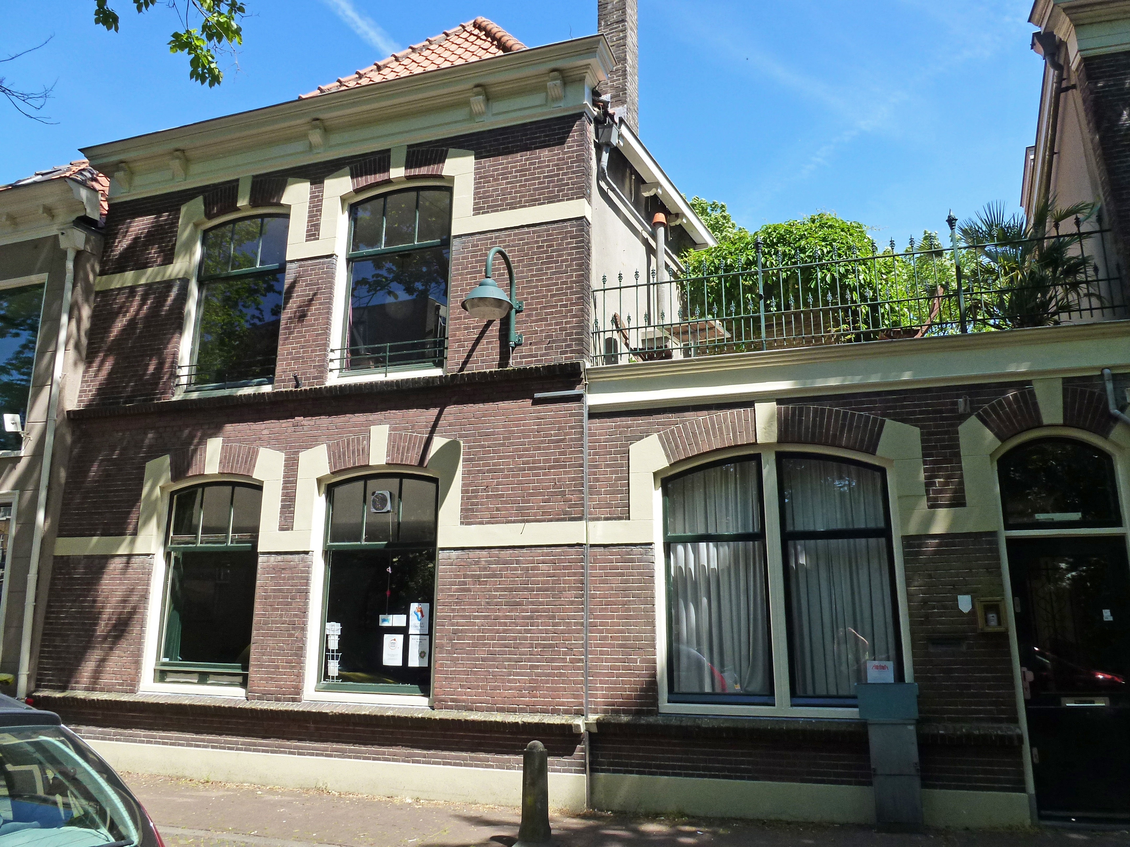 Spieringstraat 113 en 113a is een breed pand dat bestaat uit 2 delen. Links twee verdiepingen, rechts een verdieping jpg